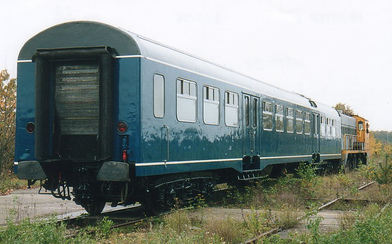 Plan W rijtuig B4118 van het NSM in de oorspronkelijk kleurstelling te Amersfoort.